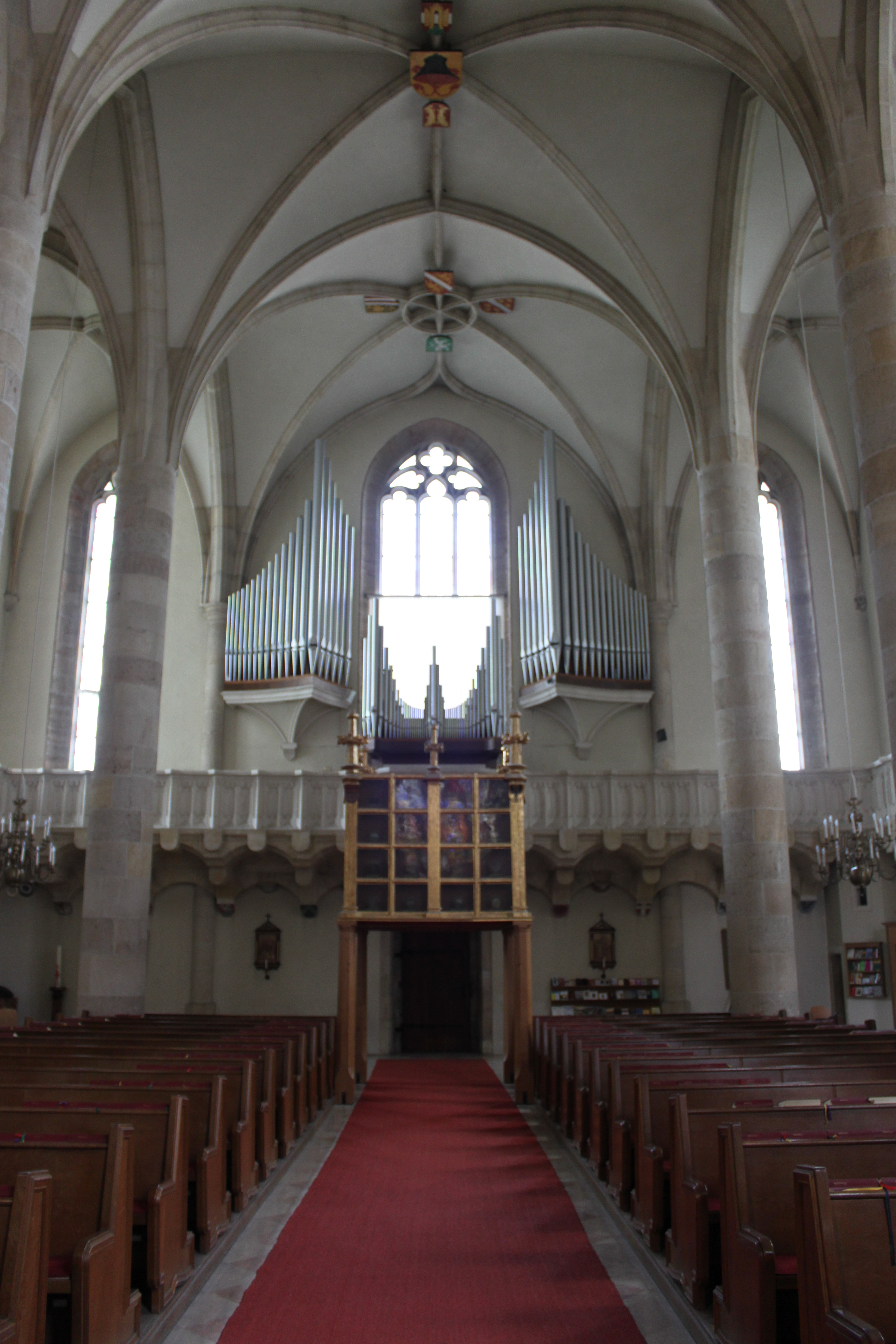 Georgskapelle, Emporenwand, Orgel, Baldachin im Mittelgang